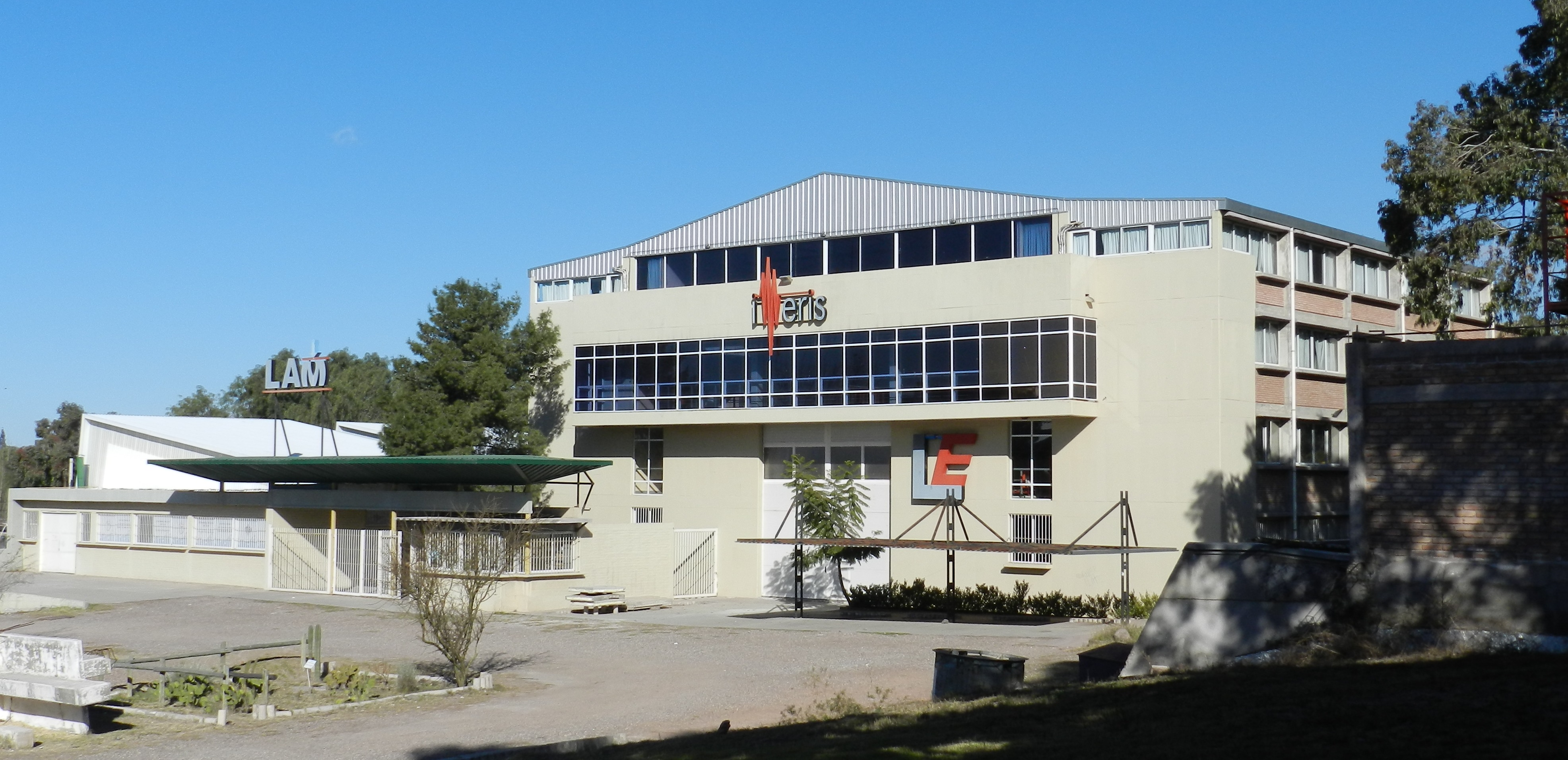 Instituto de Mecánica Estructural y Riesgo Sísmico, Facultad de Ingeniería UNCUYO.